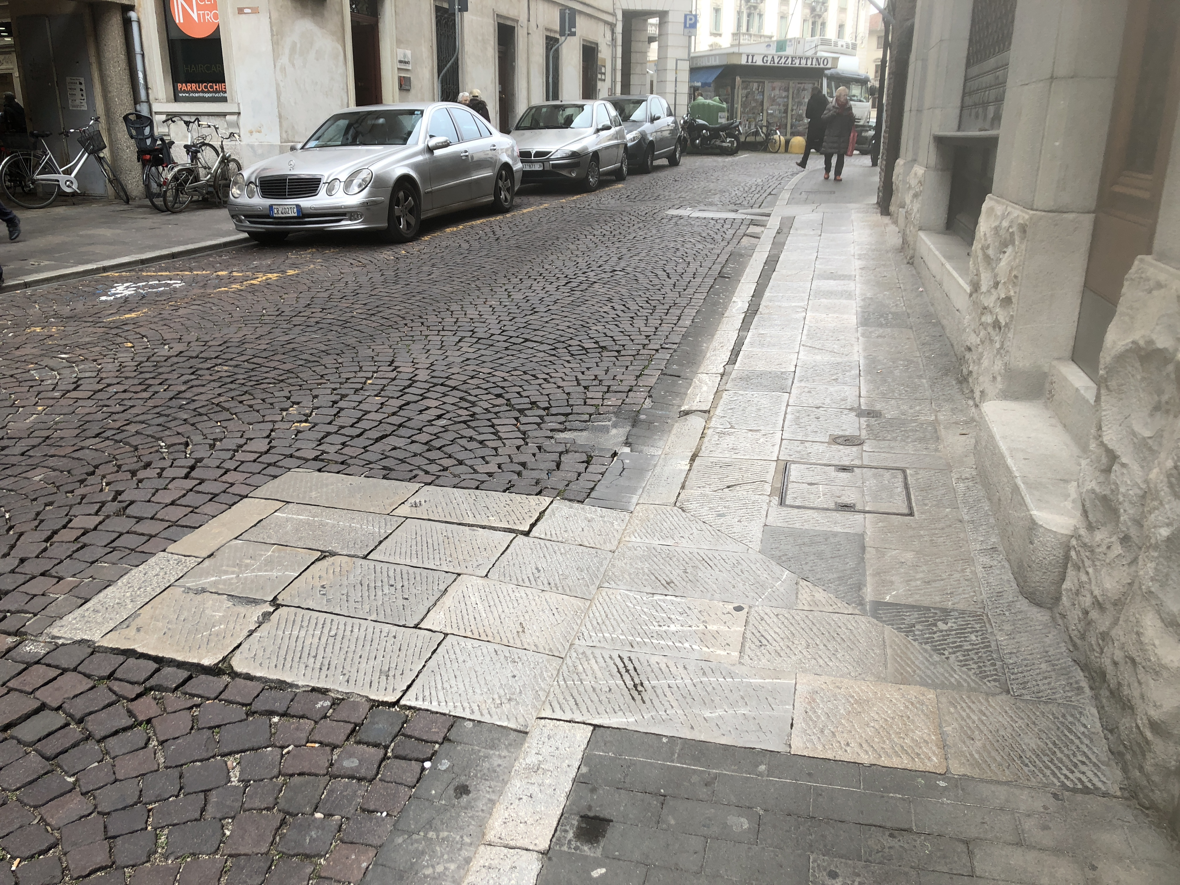 Porta Grazzano Interna 2